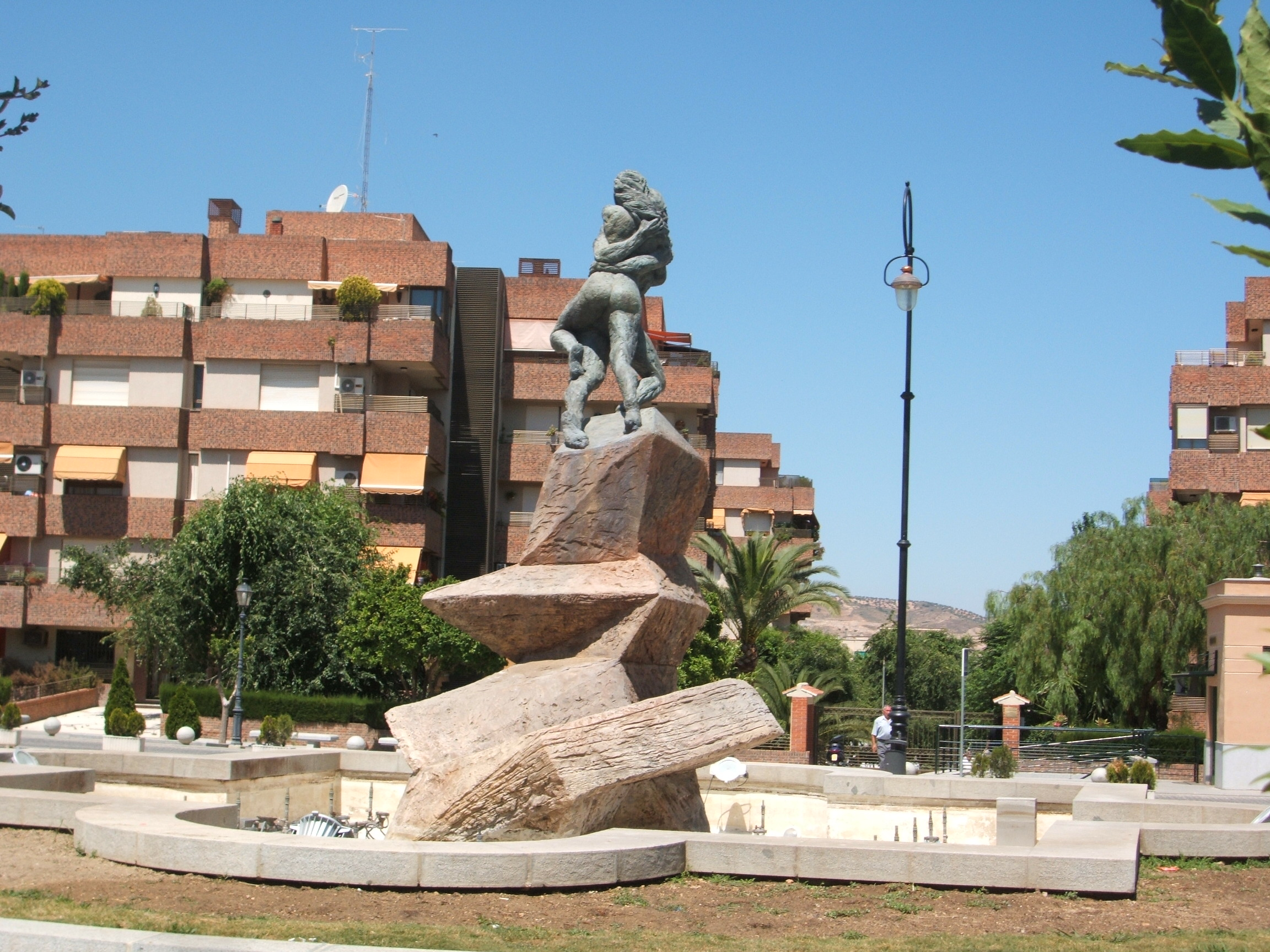 escultura de la peña de los enamorados